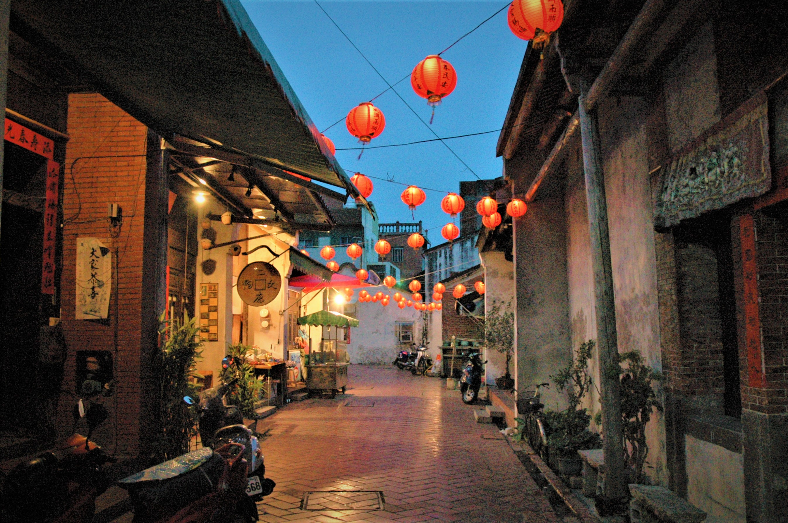 中文（台灣）: 鹿港老街小巷07